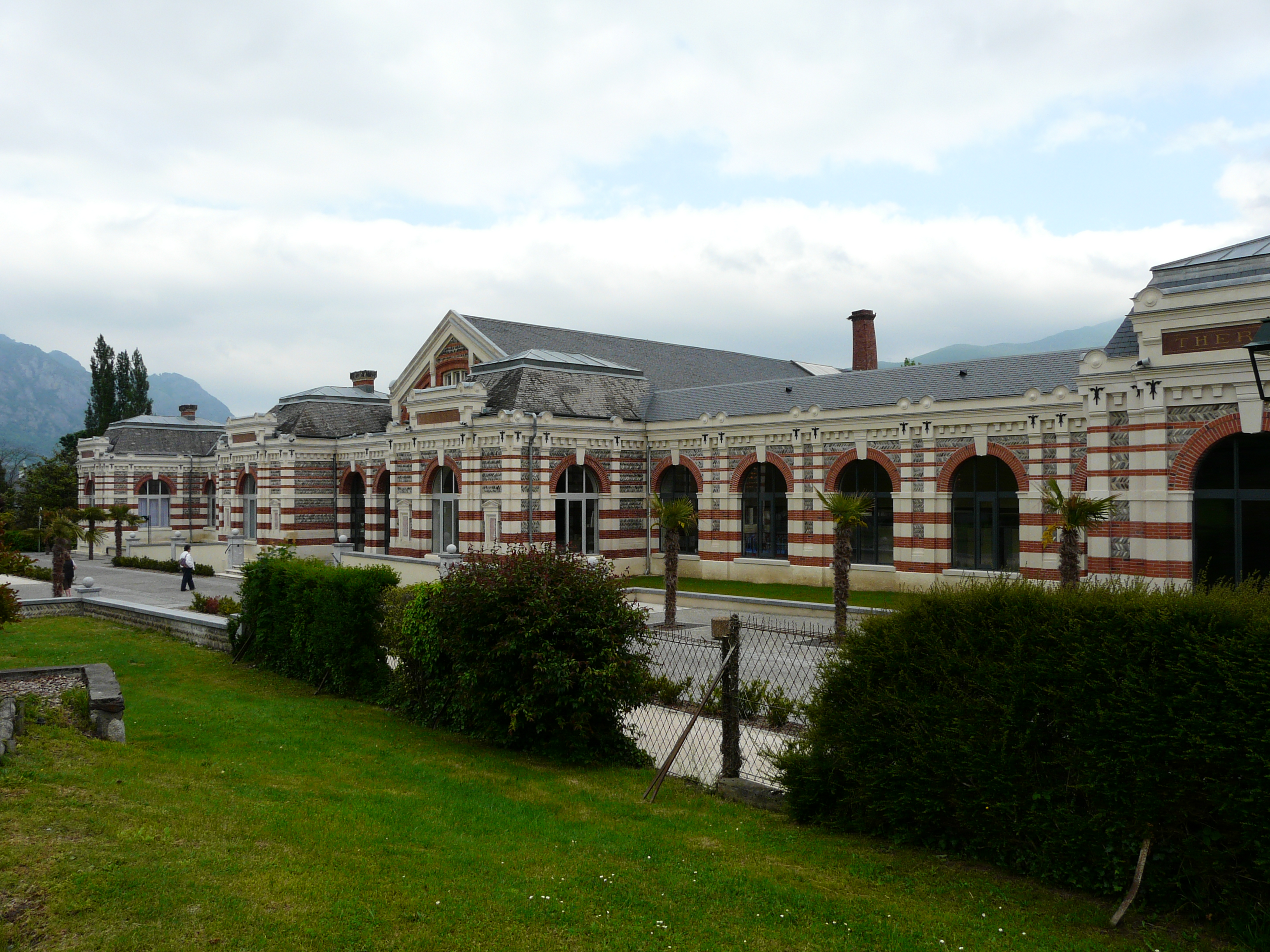 Les thermes d'Argelès-Gazost (Hautes-Pyrénées, France).